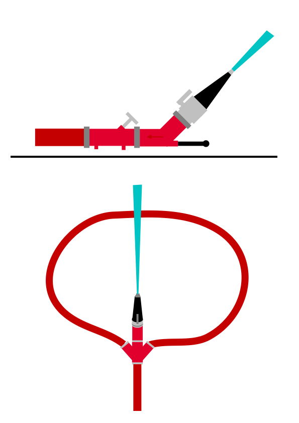 Aufbau eines Behelfsmonitores